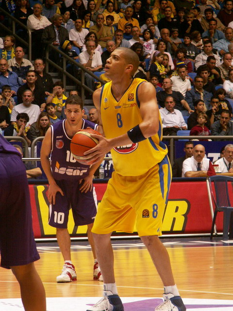 אנתוני פארקר